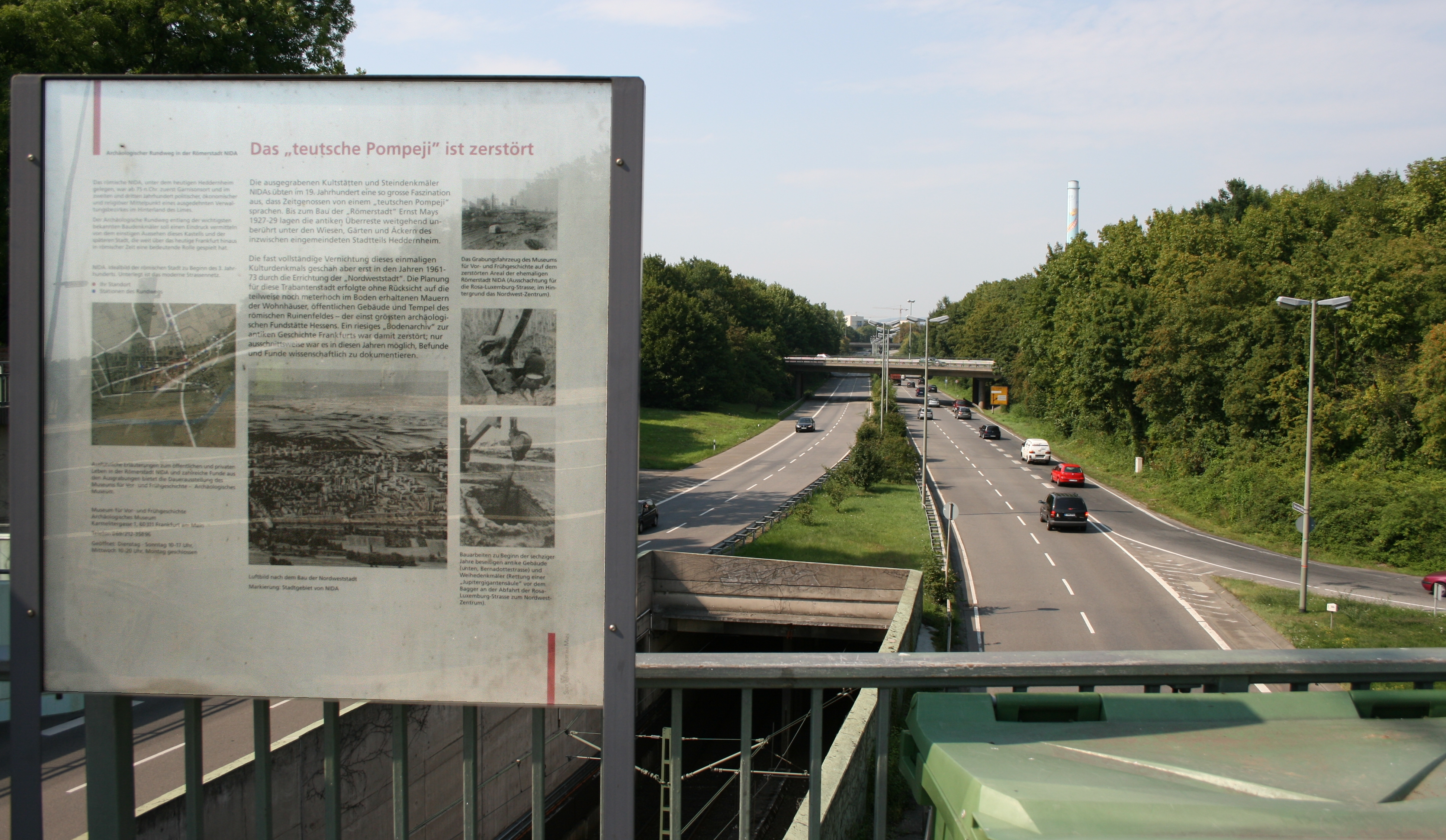 Römerstadt Nida-Heddernheim, im 19. Jahrhundert als das "deutsche Pompeji" bezeichnet. Blick von der Straßenbrücke an der U-Bahn-Station Römerstadt nach Norden entlang der Rosa-Luxemburg Straße. Hier befand sich der Kernbereich der römischen Siedlung. Das Schild weist auf die Zerstörung der römischen Siedlung durch die Baumaßnahmen des 20. Jahrhunderts hin.